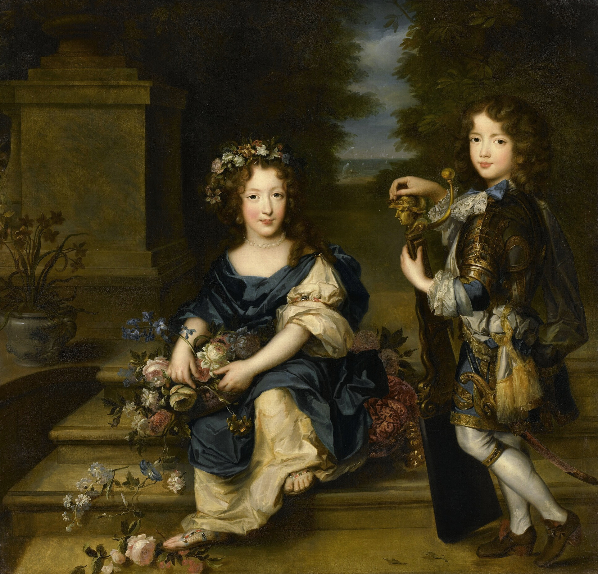 copie d'après un original jadis au château d'Eu ; commandé par Louis-Philippe pour le musée historique de Versailles en 1839